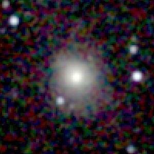 Galaxy NGC 51